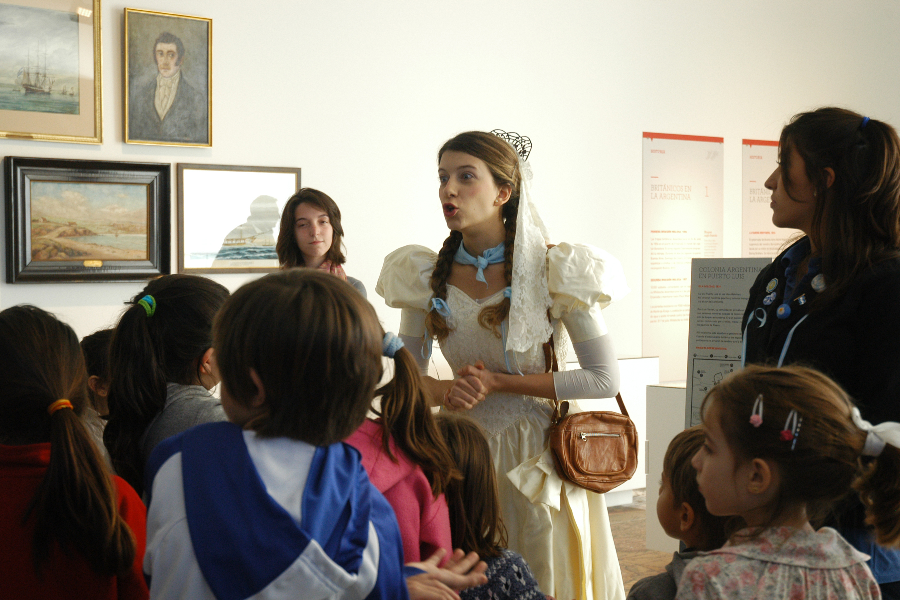 Buenos Aires, 24 de julio de 2014 - En estas vacaciones de invierno el Museo Malvinas e Islas del Atlántico Sur se llenó de chicos y chicas que fueron a conocer la historia de nuestras Islas Malvinas. De la mano de Malvina y sus vestidos de época, fueron guiados en el recorrido especialmente pensado para niños de entre 6 y 12 años. Fue el debut de las visitas guiadas teatralizadas que se realizarán estas vacaciones. Para las vacaciones de invierno de julio de 2014, el Museo Malvinas de Buenos Aires incluyó visitas guiadas teatralizadas para niños de entre 6 y 12 años. Malvina, con vestido de época, hace referencia a Malvina Vernet.